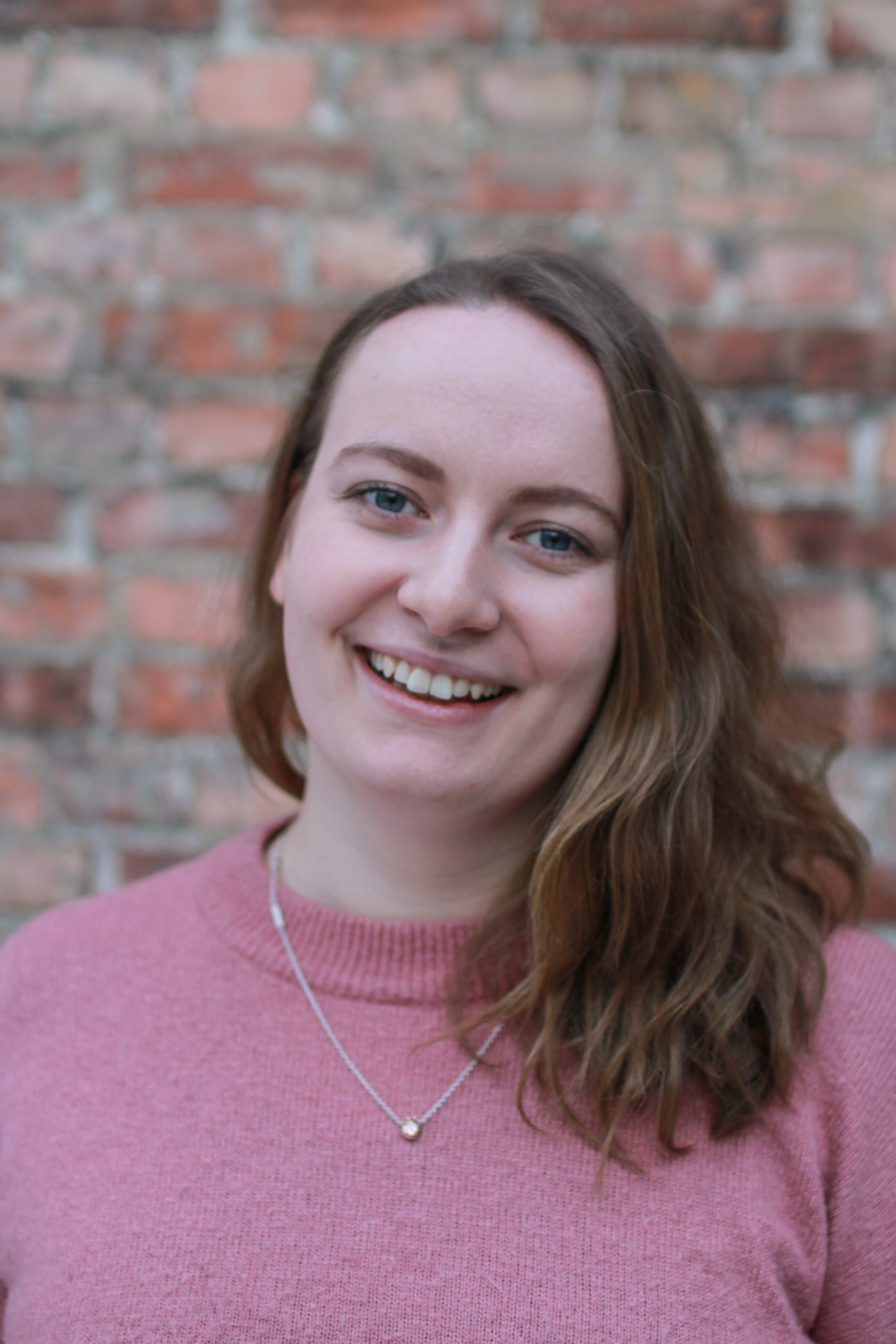 Leder i Natur og Ungdom Ingrid Skjoldvær. Foto: Amanda Orlich/Natur og Ungdom